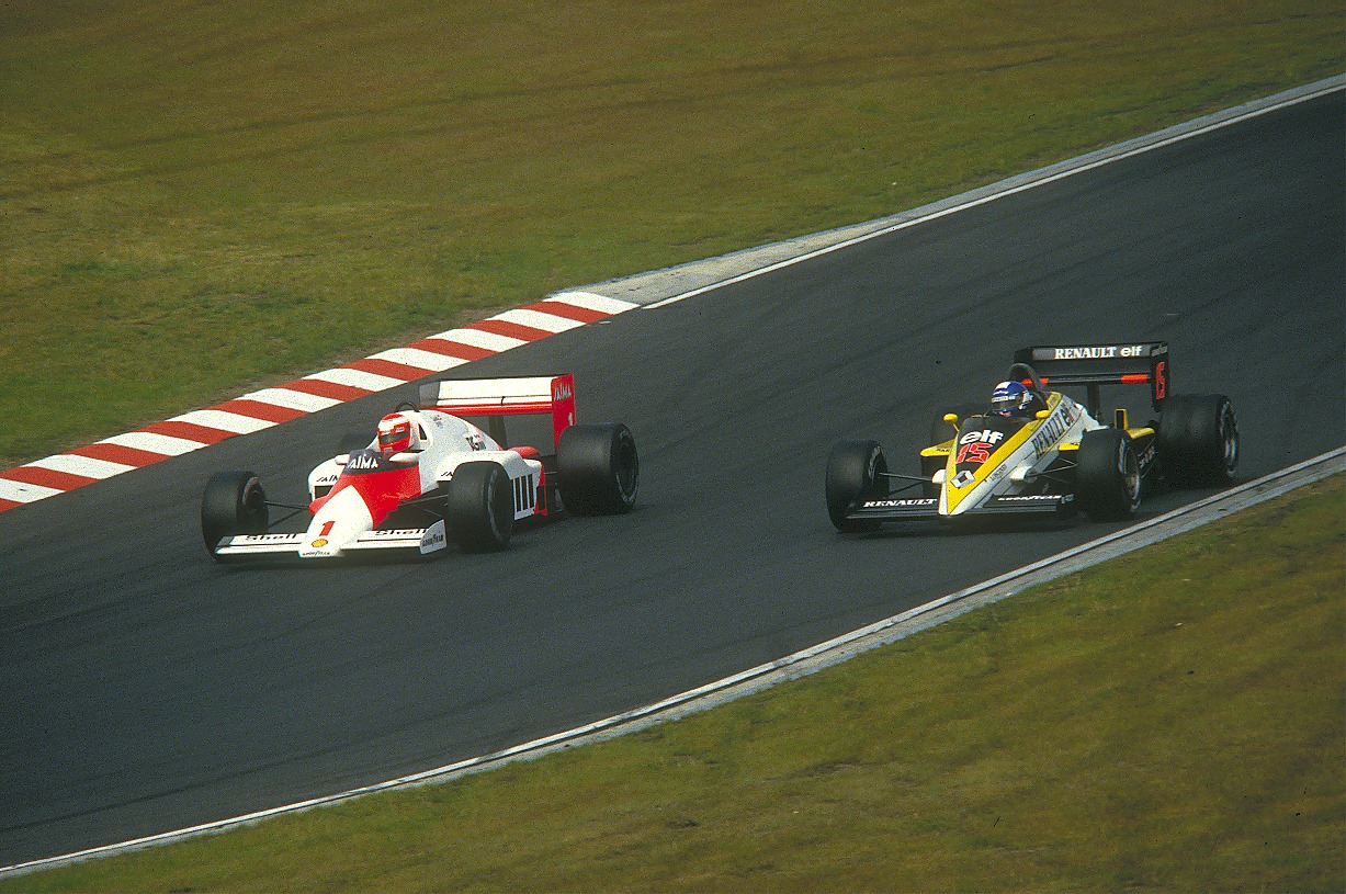 Niki Lauda (Nr. 1) und Patrick Tombay (Nr. 15) beim Training zum Großen Preis von Deutschland